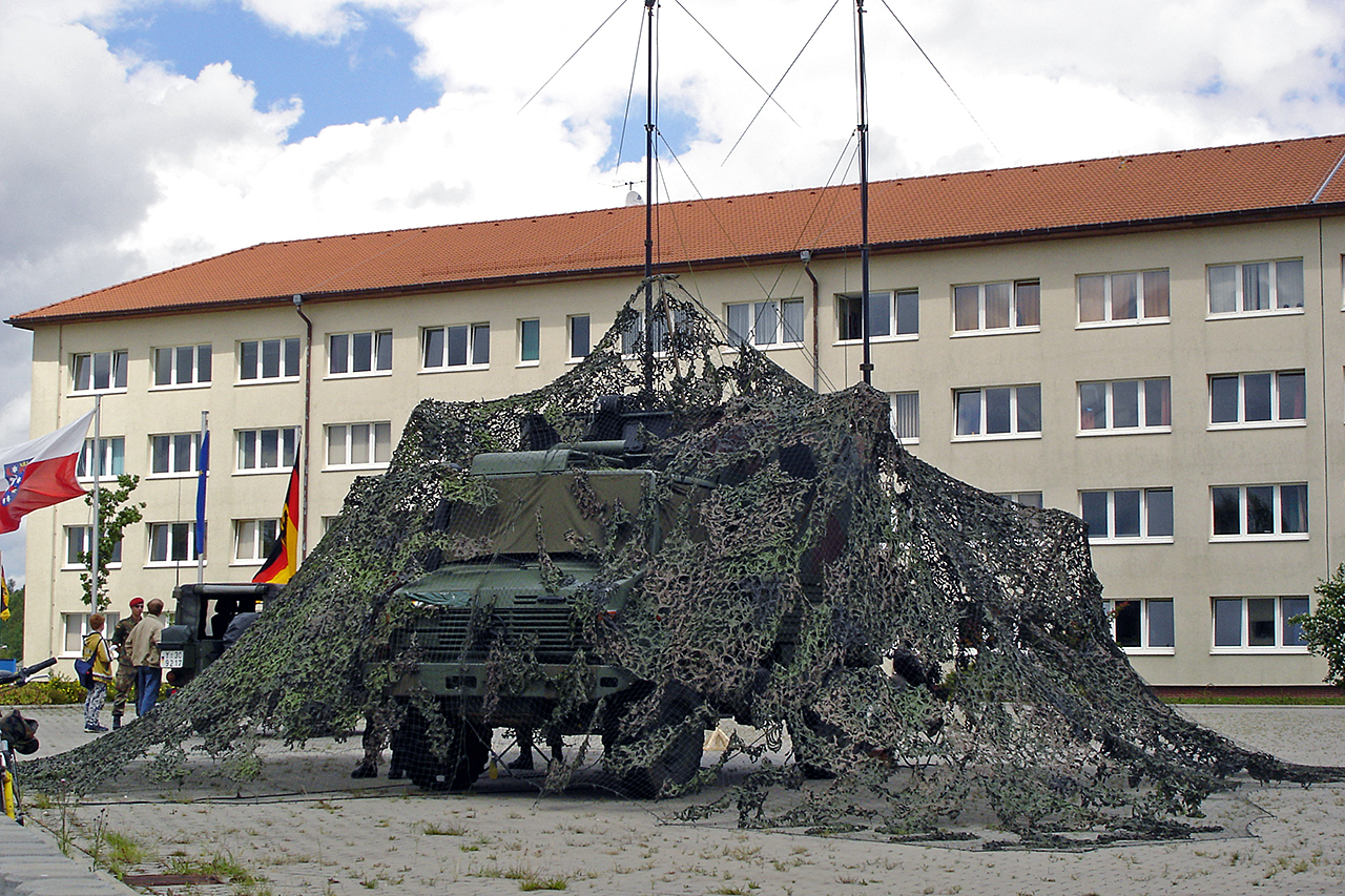 Lkw 2t tmil gl (Unimog U 1300 L), Sprech-Funk-Trupp A, 2./ PiBtl 722, in Gera 2004.